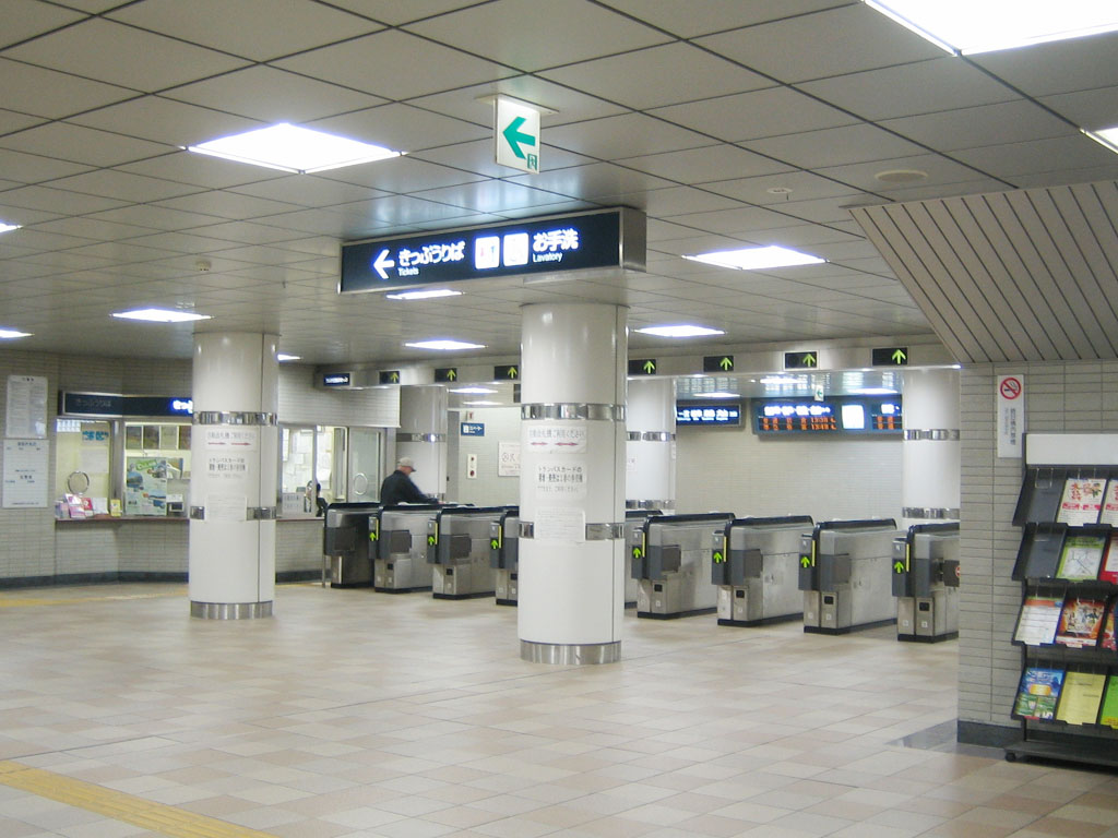 Chūkyō-Keibajō-Mae Station (中京競馬場前駅), in Nagoya, Aichi, Japan